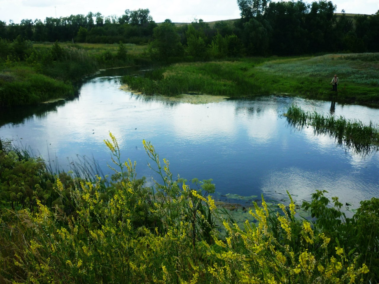 Это река Савала,протекающая в селе Братки!